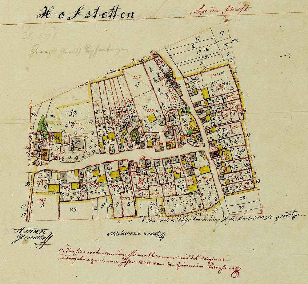 Historische Ortskarte von Hofstetten bei Hitzhofen von 1813. Maßstab: 1:2500.